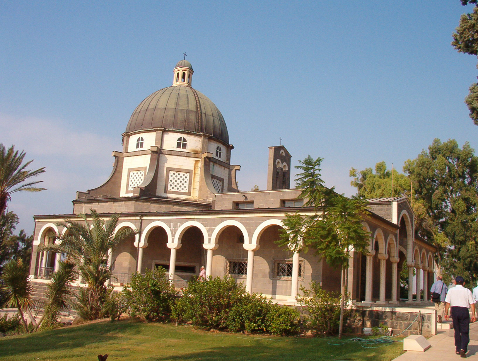 chiesa costruita sul monte delle Beatitudini in Palestina